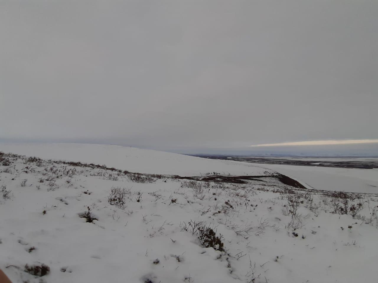 Современная фотография сопки с расположенным на ней могильником.